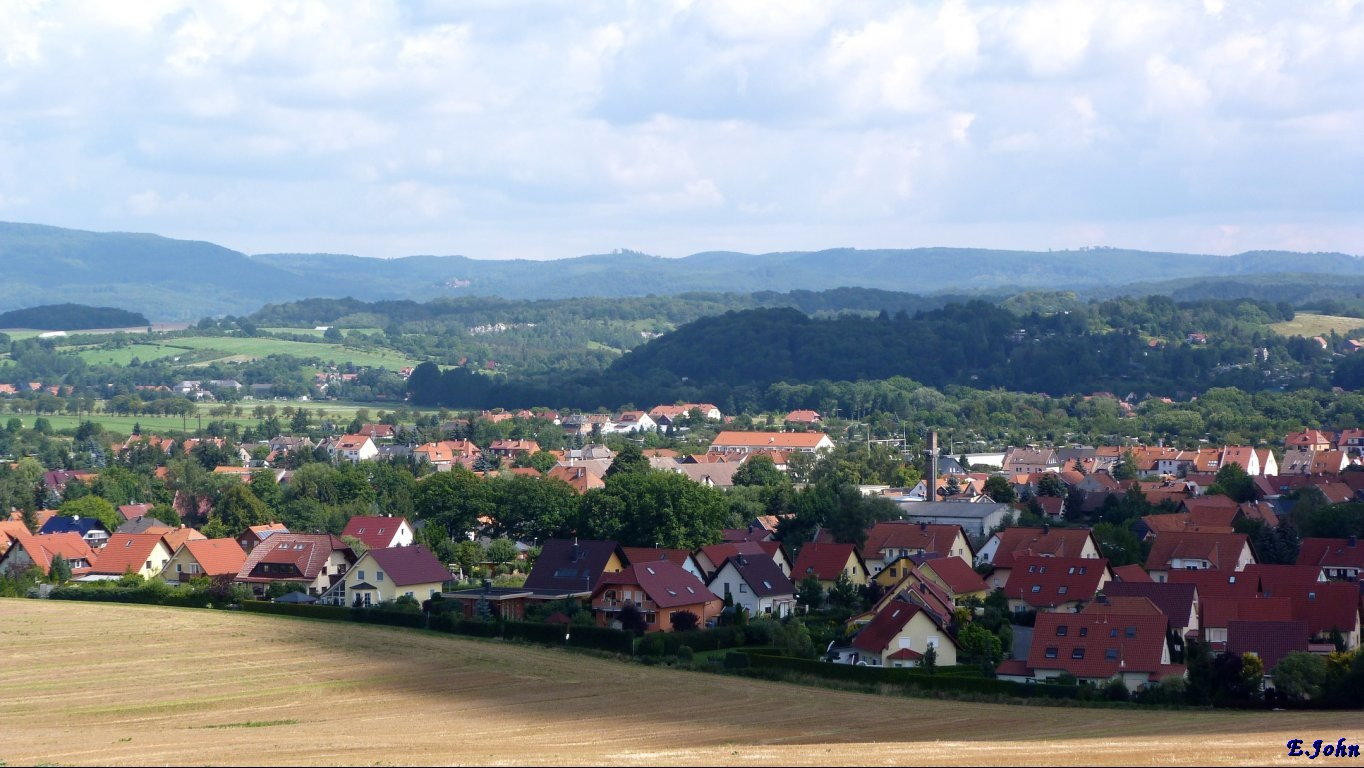 99734 Nordhausen, Blick über Salza zum Südharz.